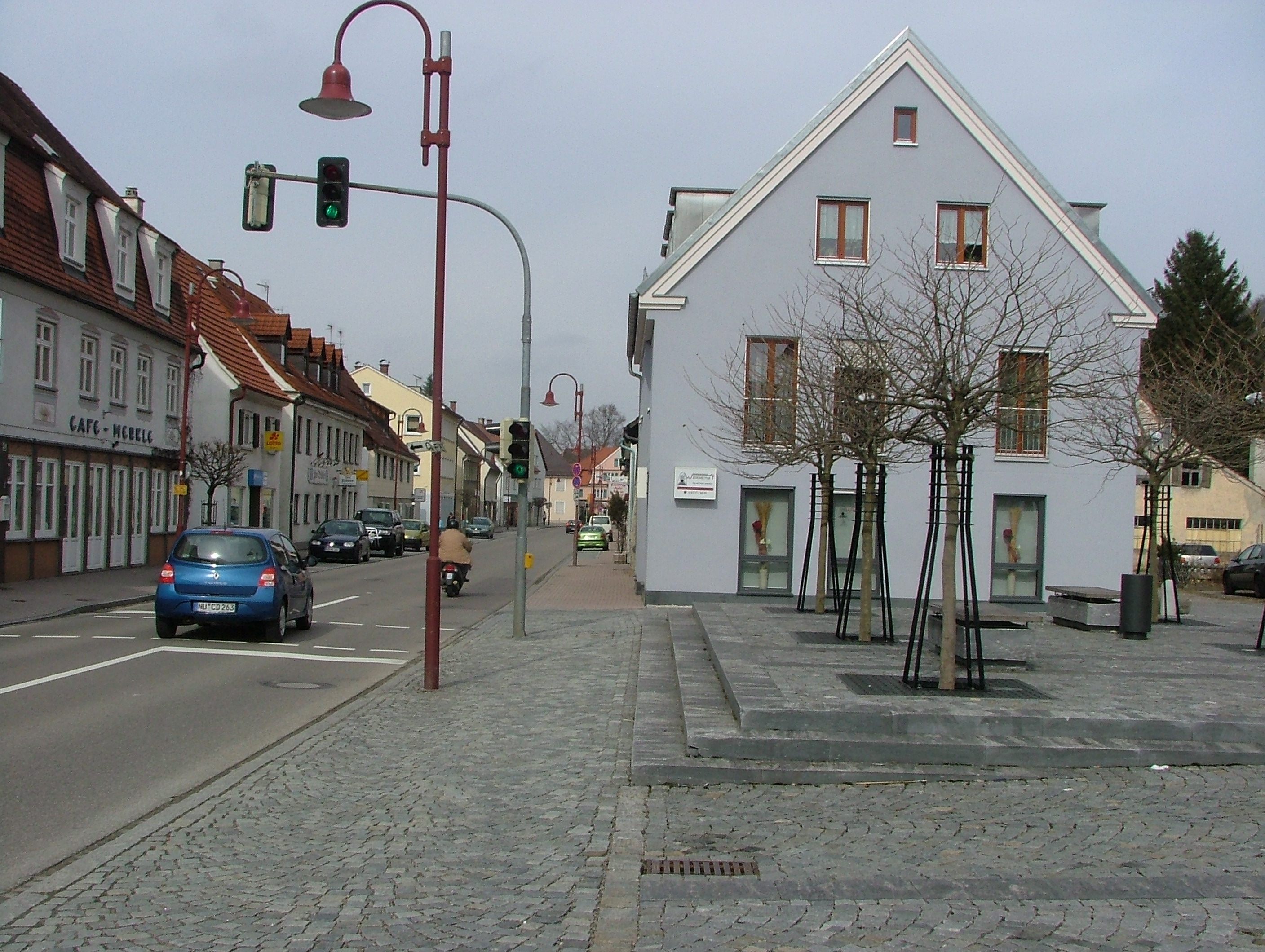 Memminger Straße Altenstadt